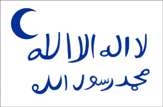 Bandera del Alto Asir Imagen realizada por J. Ollé Véase también: Wikipedia:Autorizaciones/Banderas de Jaume Ollé Categoría:Banderas (imagen)